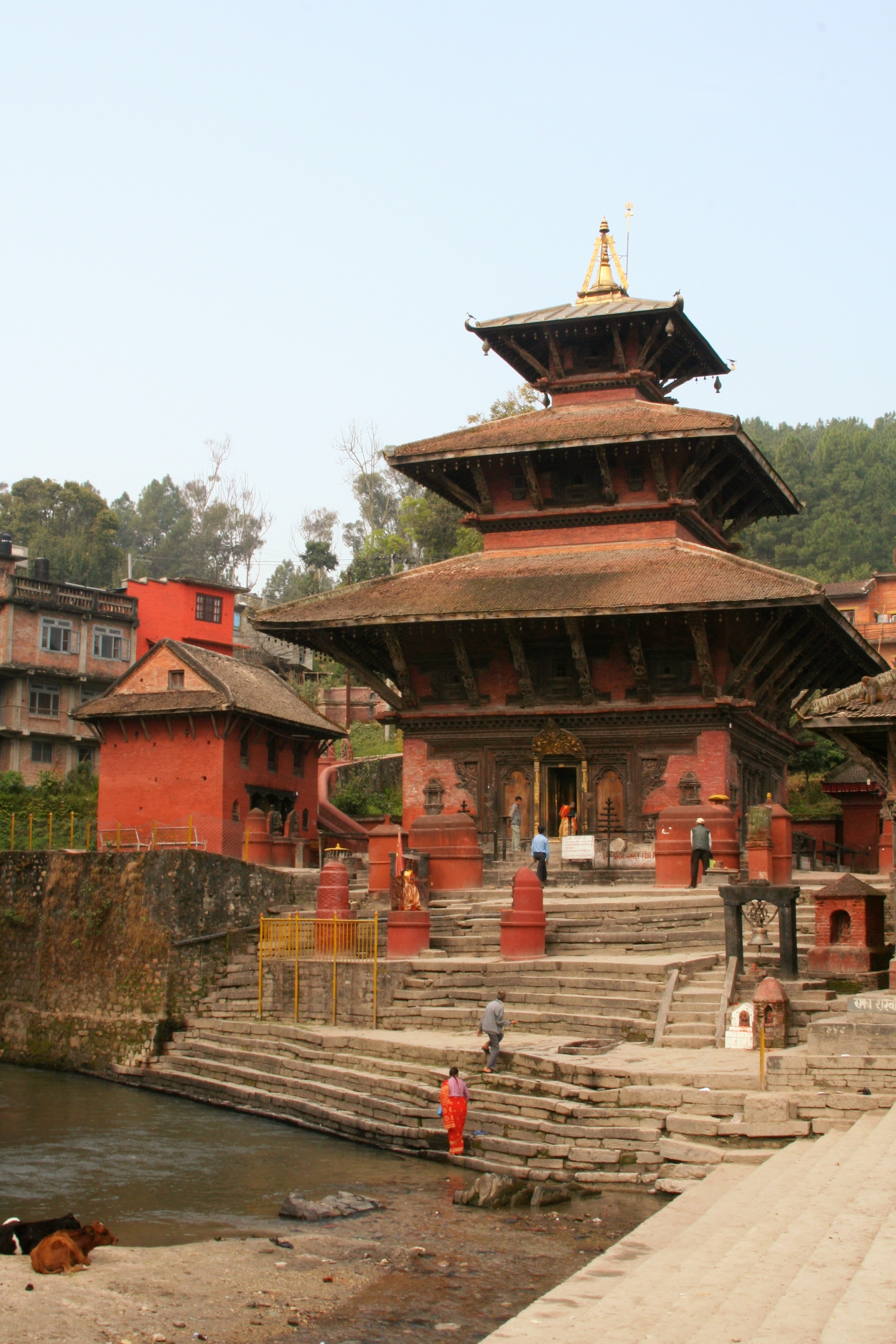 Gokarna Mahadev temple from the east